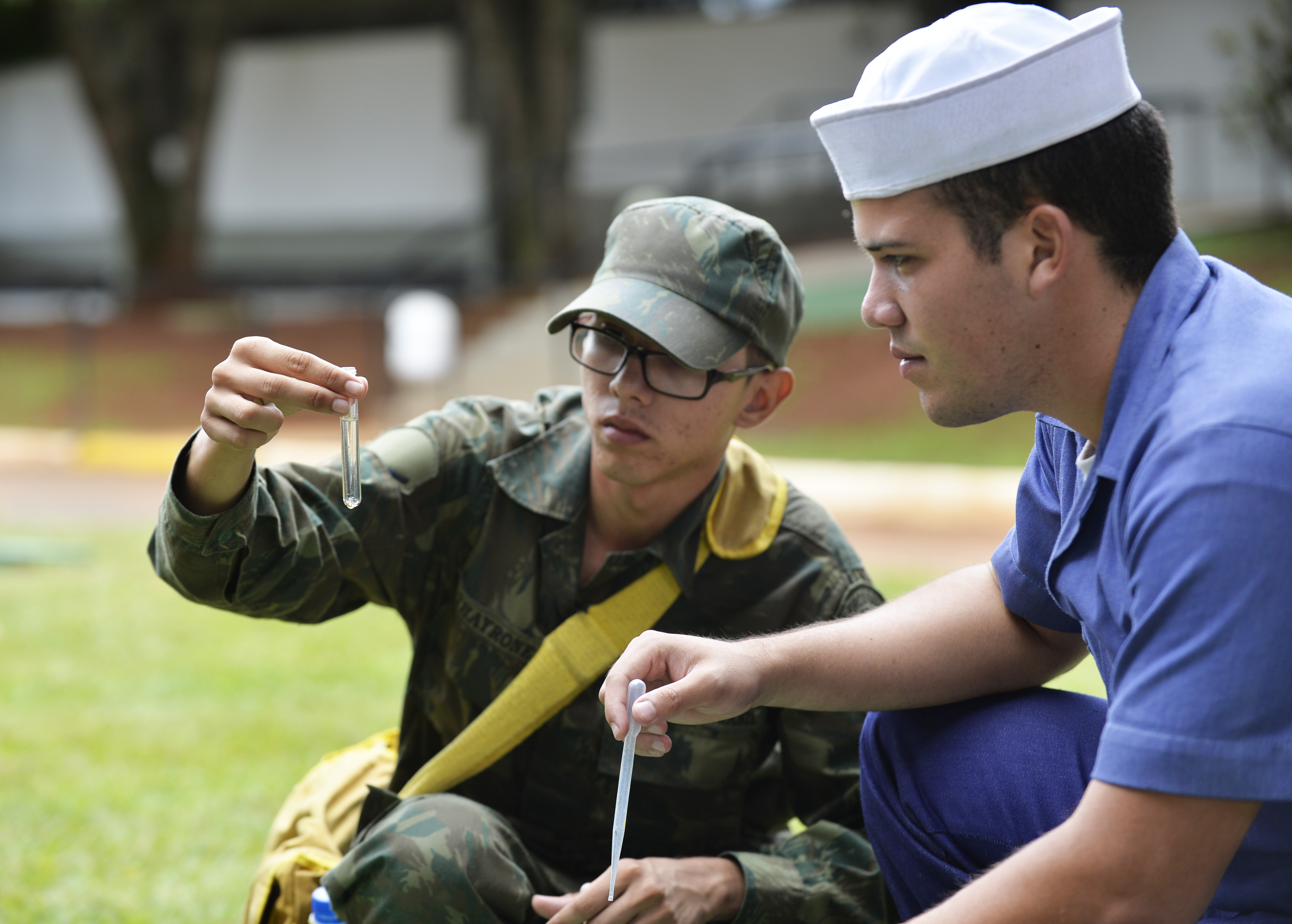 29/01/2016, Brasília - DF Fotos: Gilberto Alves